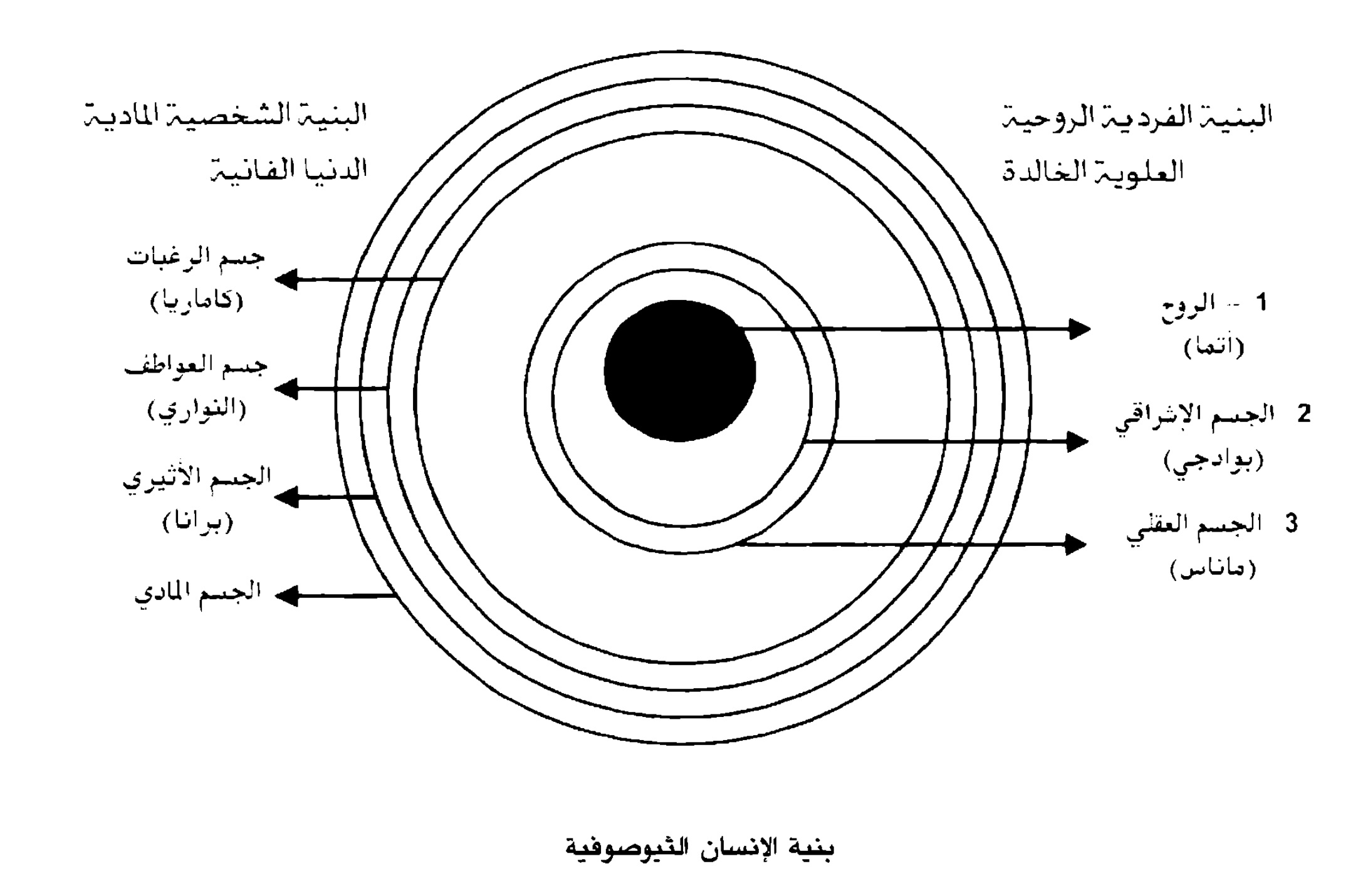 الرسم يوضح بنية الإنسان في الفلسفة الثيوصوفية الباطنية الروحية